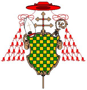 Stemma del Cardinale Alfonso Litta, Arcivescovo di Milano.